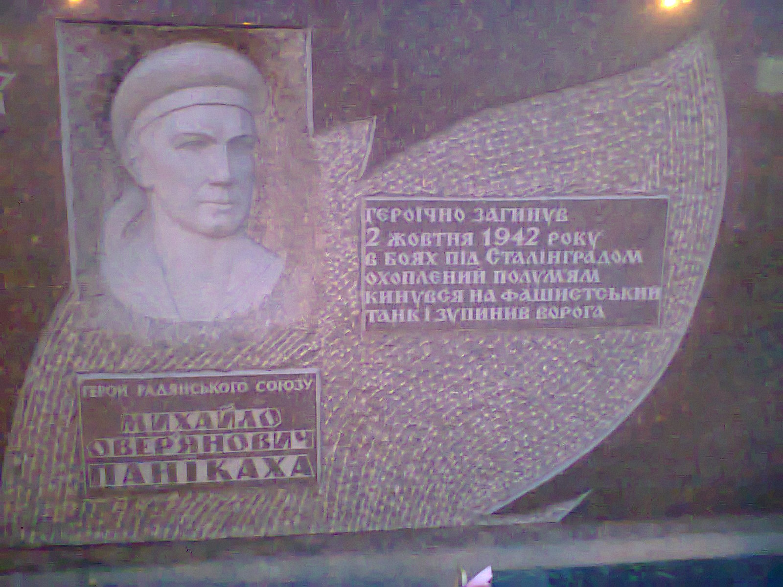 Пам'ятний знак на честь Панікахи М.О. встановлено на розі вулиць Запорізьке шосе та Панікахи у місті Дніпрі.